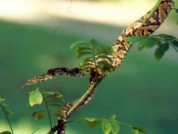 Trimorphodon biscutatus